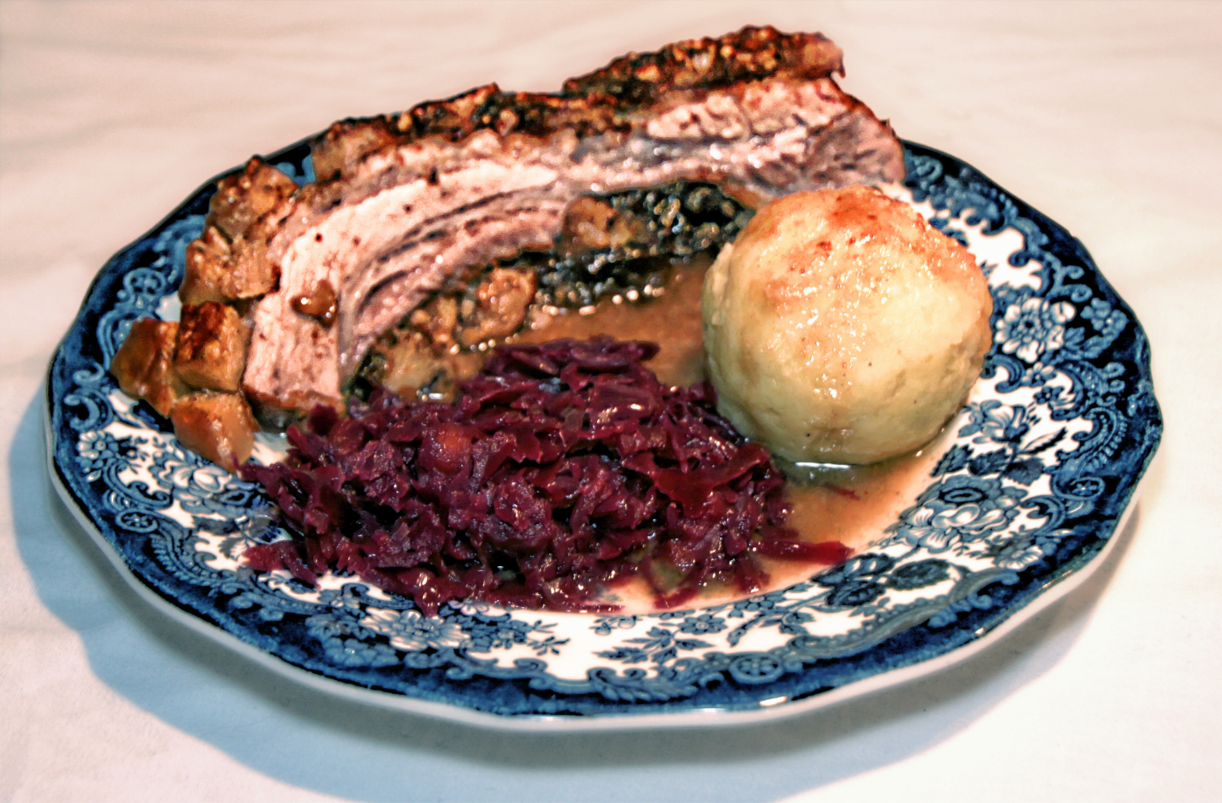 Mecklenburger Rippenbraten mit Knödel und Rotkohl